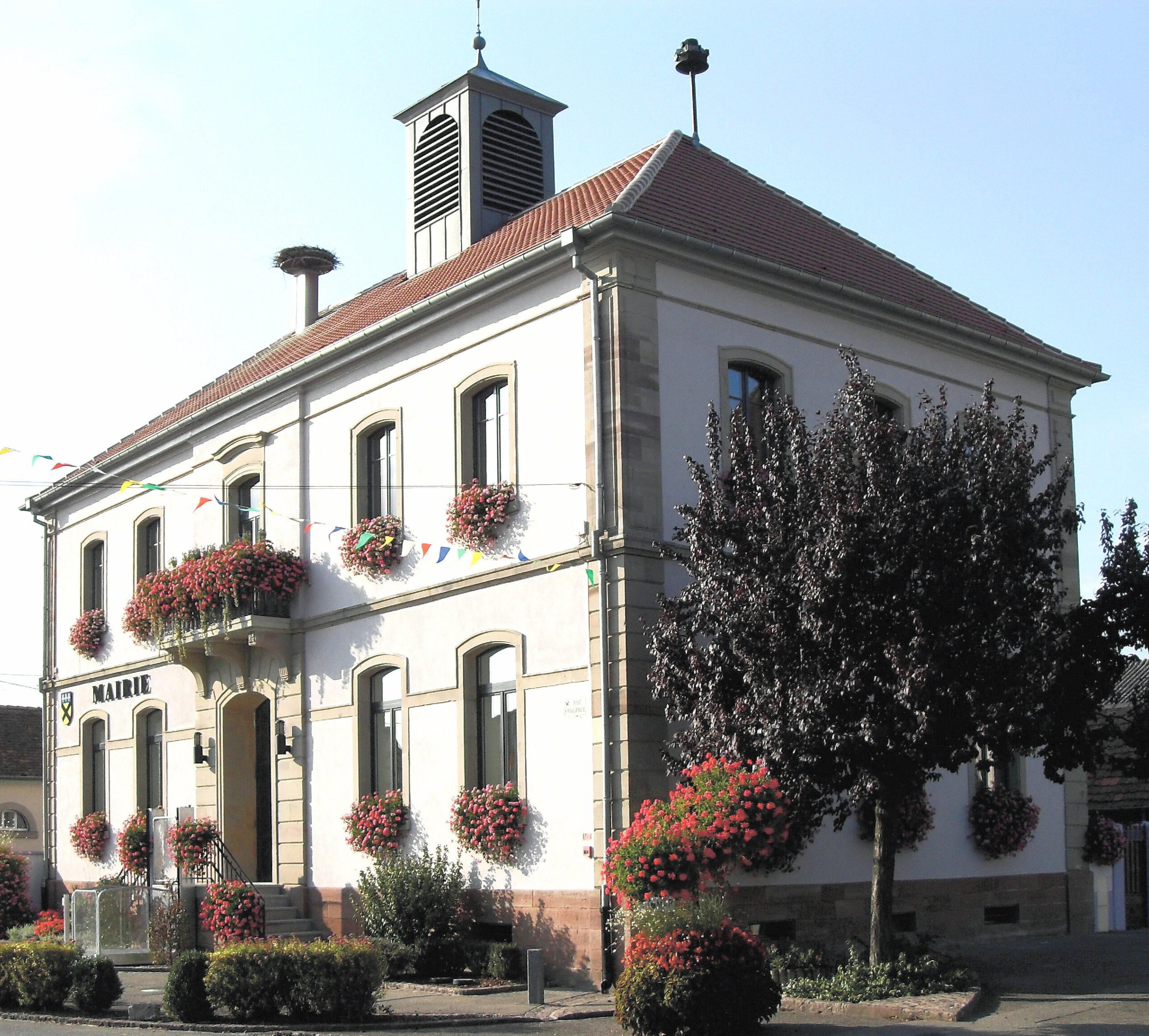 La mairie de Holtzwihr